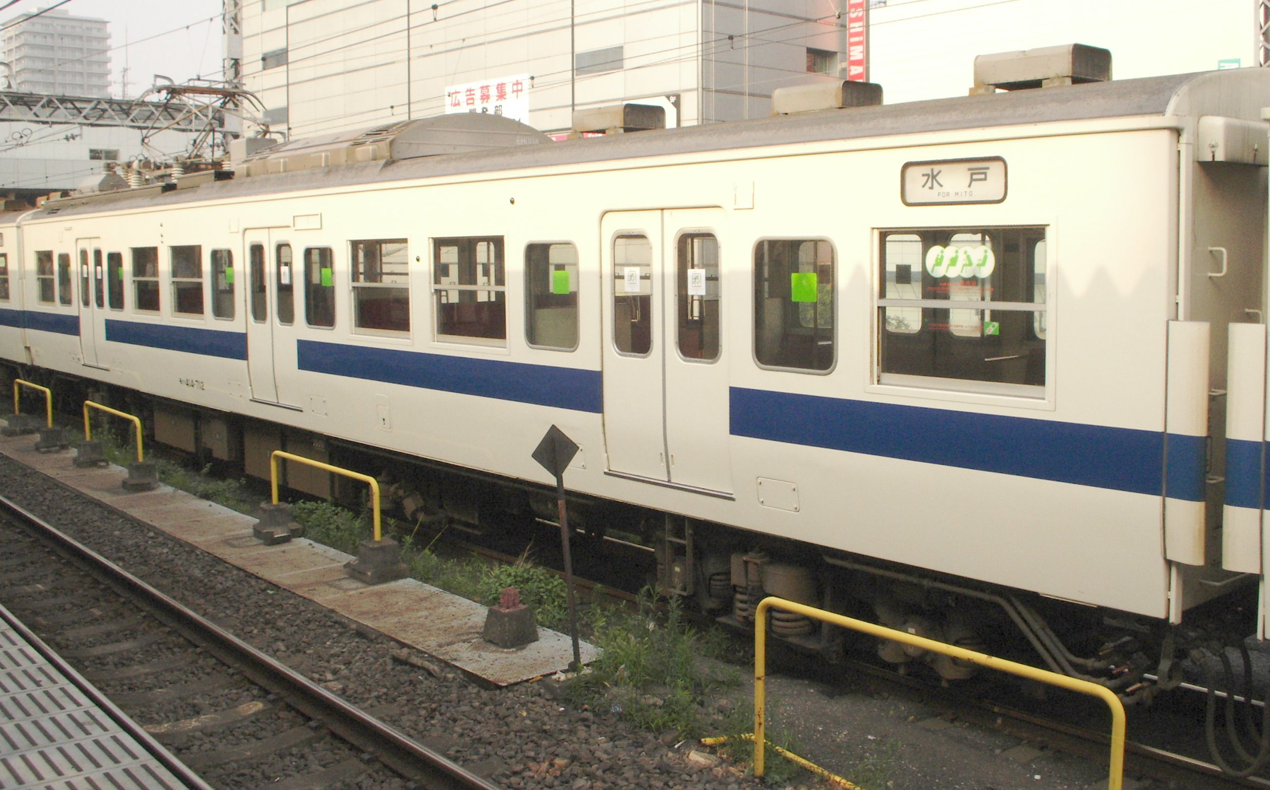 東日本旅客鉄道415系近郊形交直流電車 モハ414-712